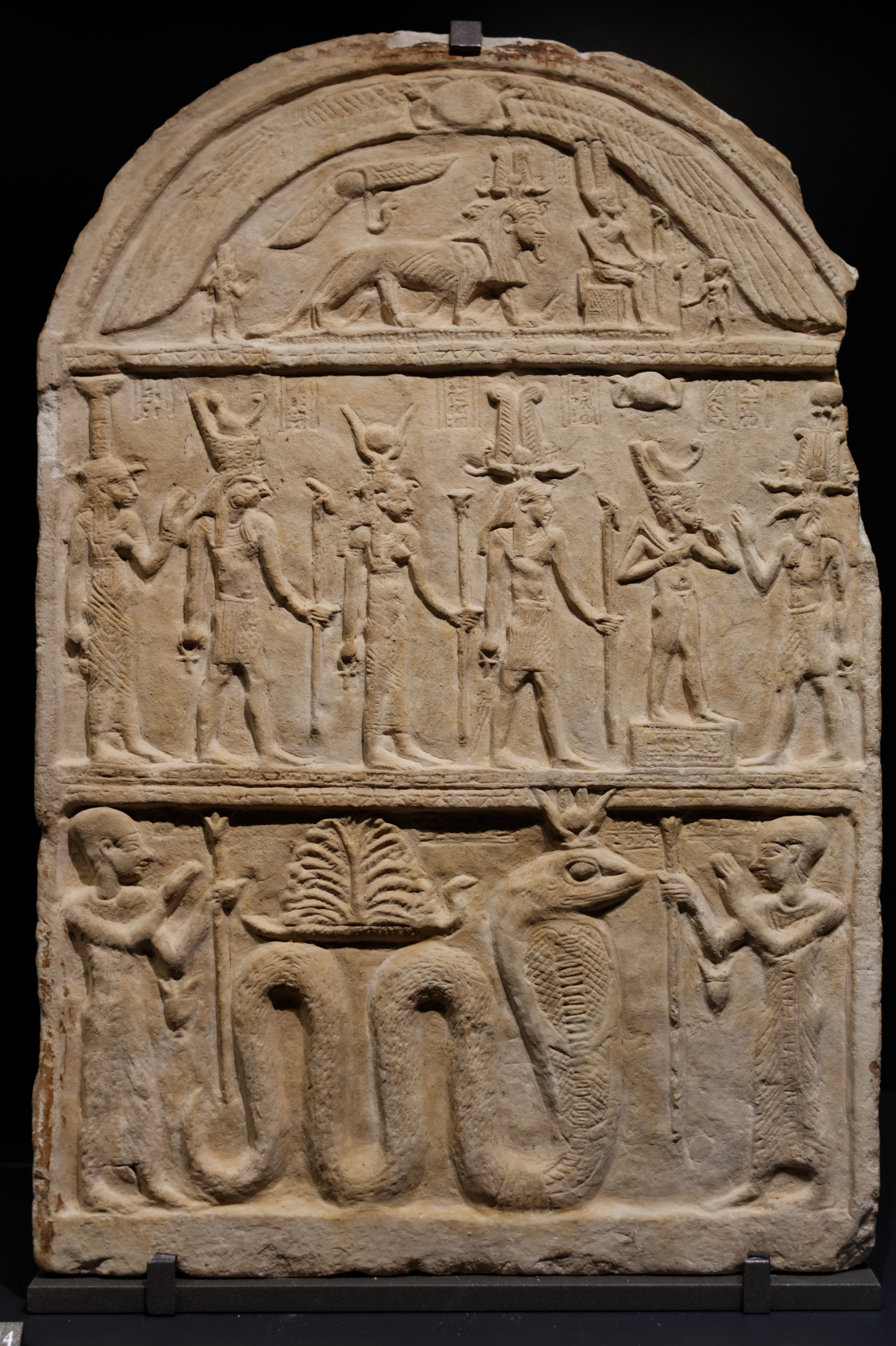 Au registre inférieur, des prêtres font des libations à une déesse uræus, probablement Hator, aussi adorée sur le site sous la forme d'un sycomore. Cet arbre était connu comme un haut lieu de culte d'Isis. Au registre médian : Nephtys, Horus, Isis, Osiris, Harpocrate et Thot. Dans le cintre : les dieux Amon et Toutou auxquels un temple était dédié. Toutou, divinité protectrice, tient des couteaux. La forme des situles tenues par les prêtres permettent de dater la stèle.